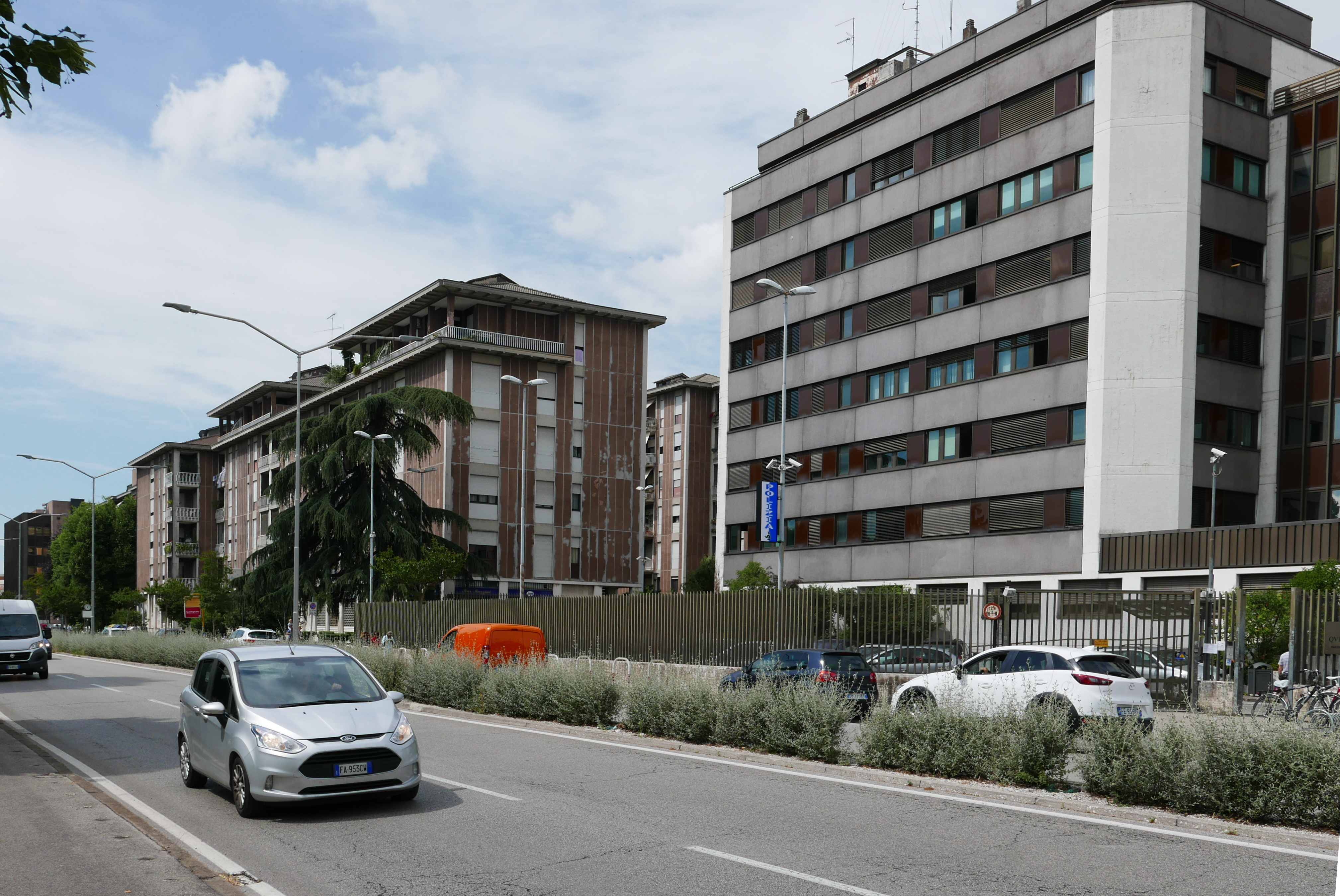 Viale Mazzini a Vicenza